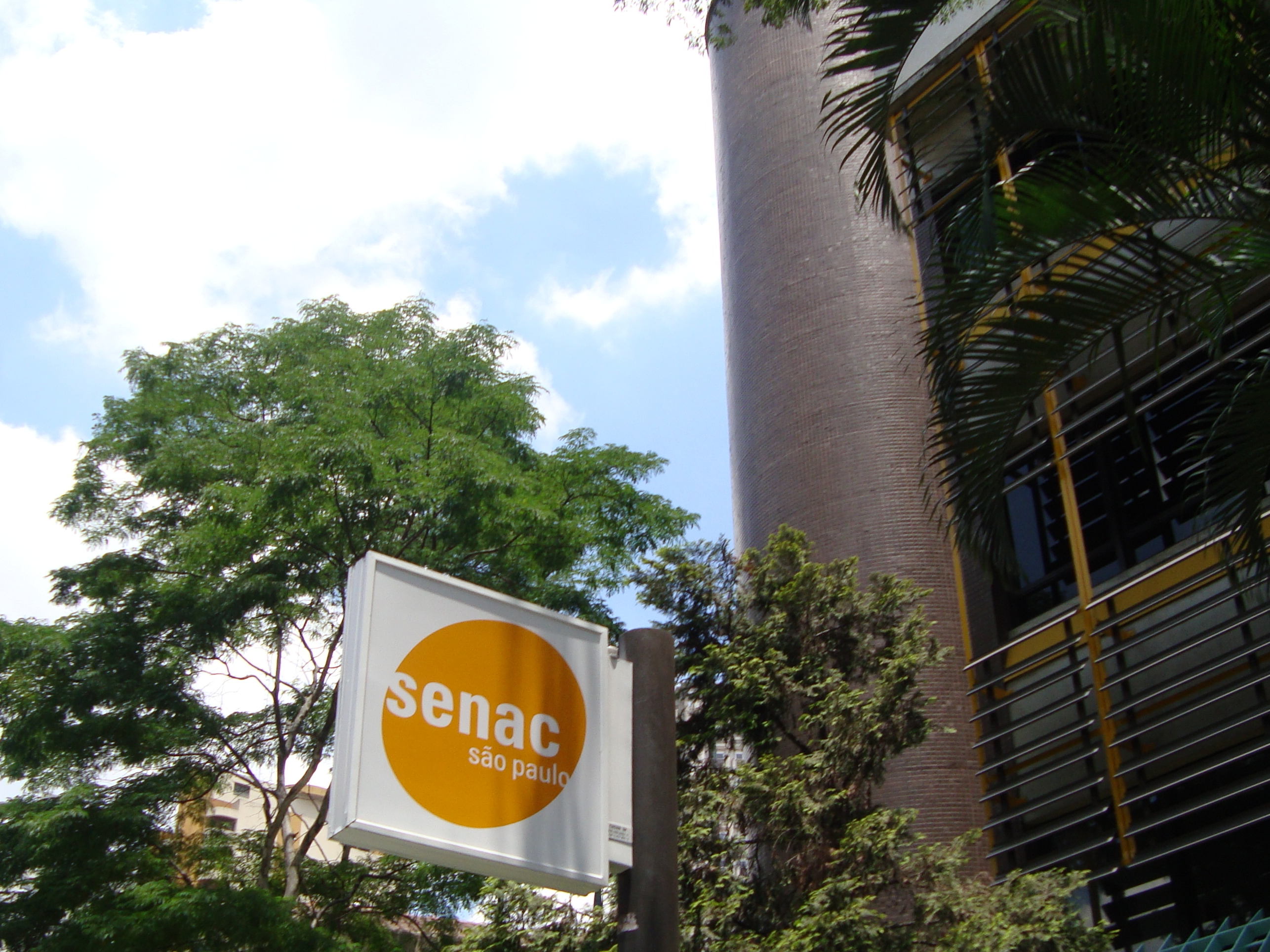 Foto do logo da unidade Santana do SENAC, localizada no Alto de Santana, cidade de São Paulo.